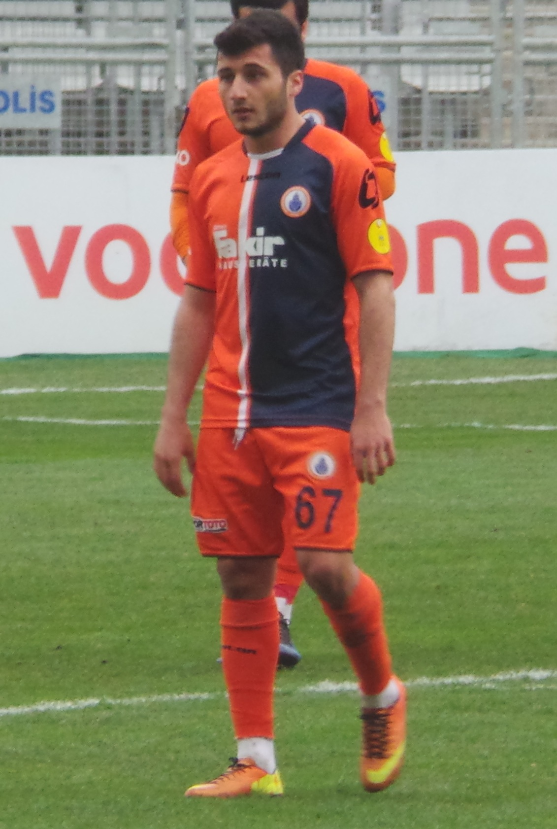 Enver Cenk Şahin